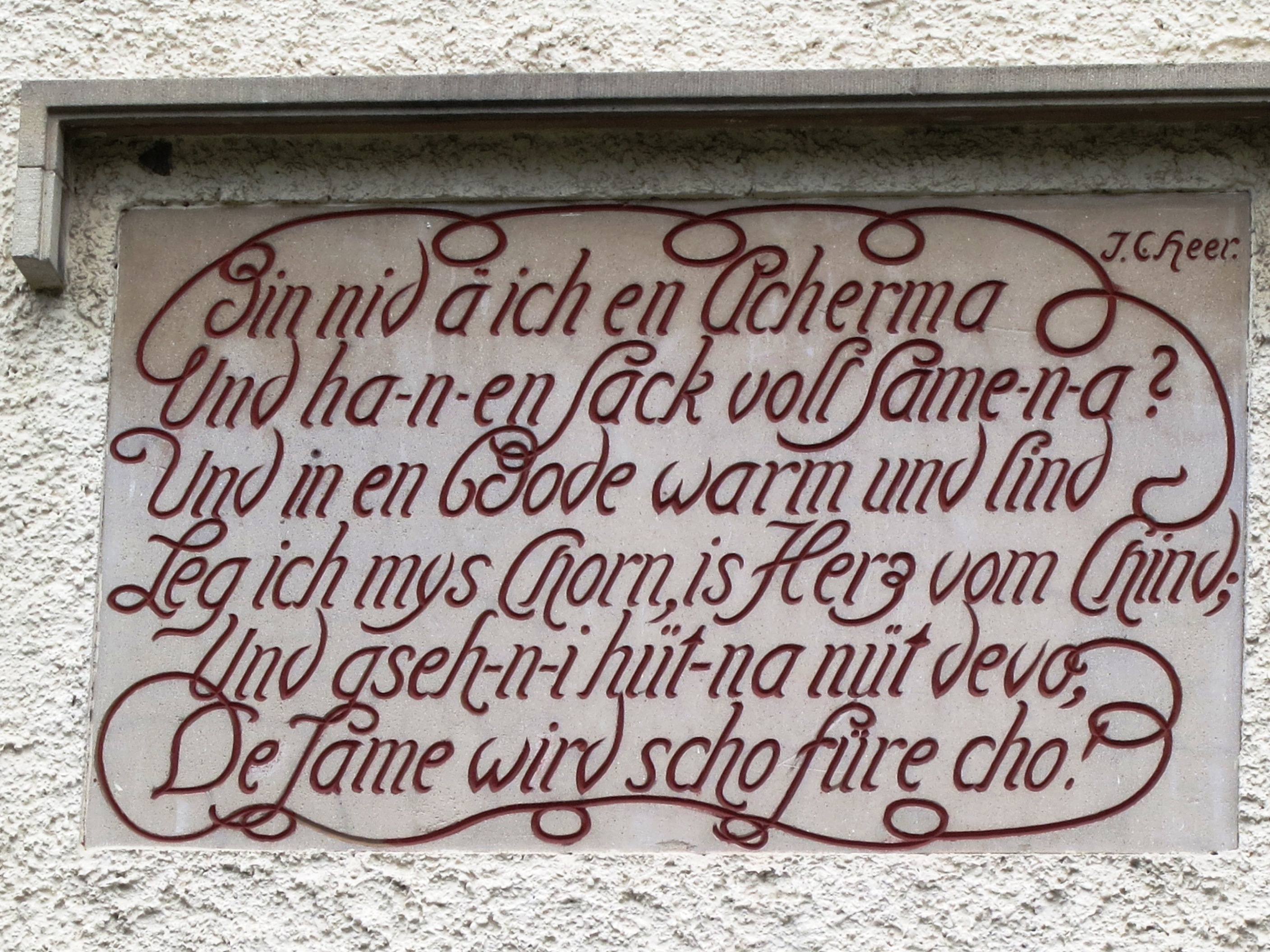 Schule, Zell ZH, Schweiz